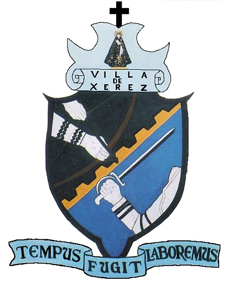 Escudo a color de Jerez, Zacatecas